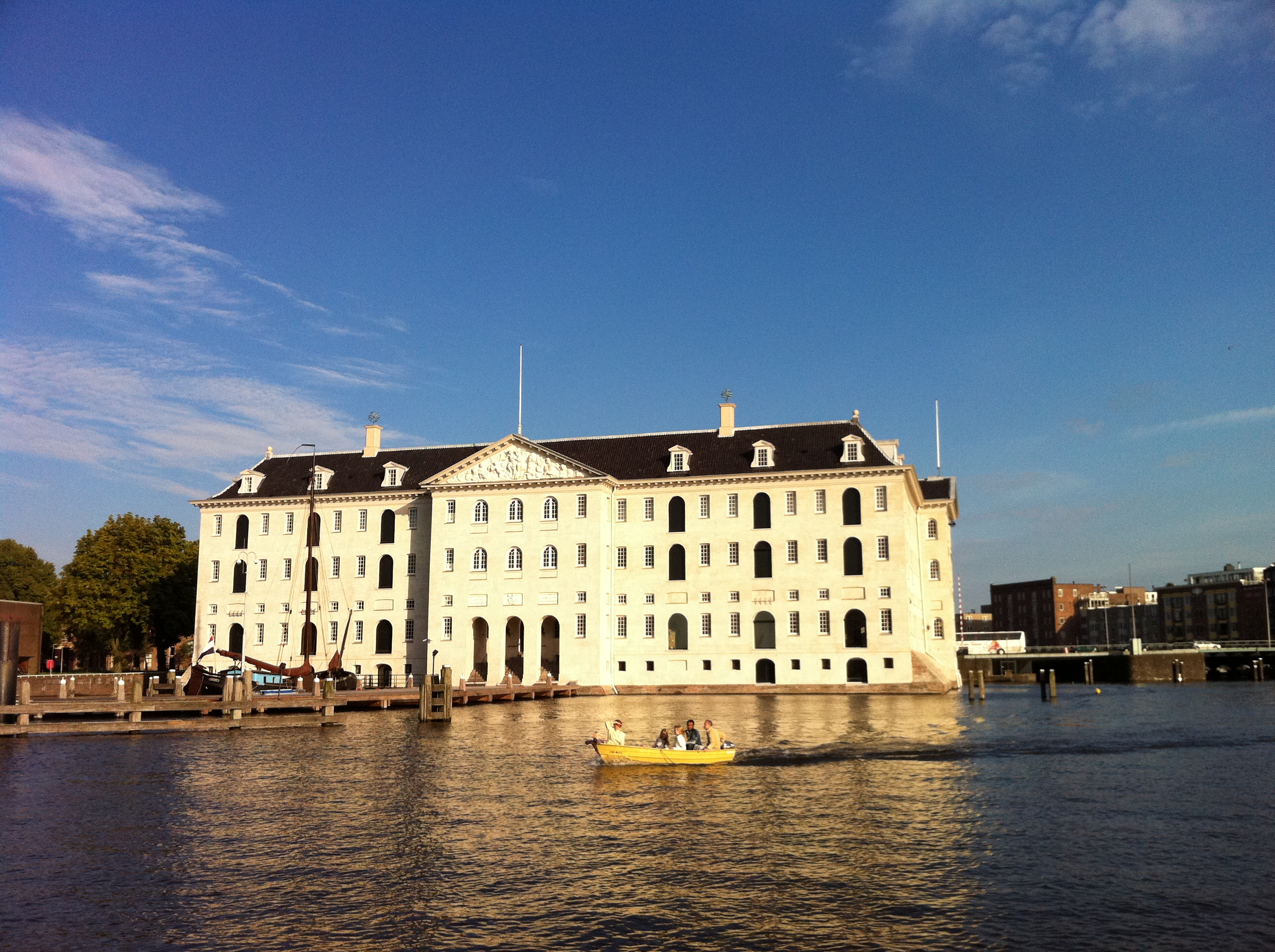 Voormalig kantoor Admiraliteit Amsterdam, nu Scheepvaartmuseum